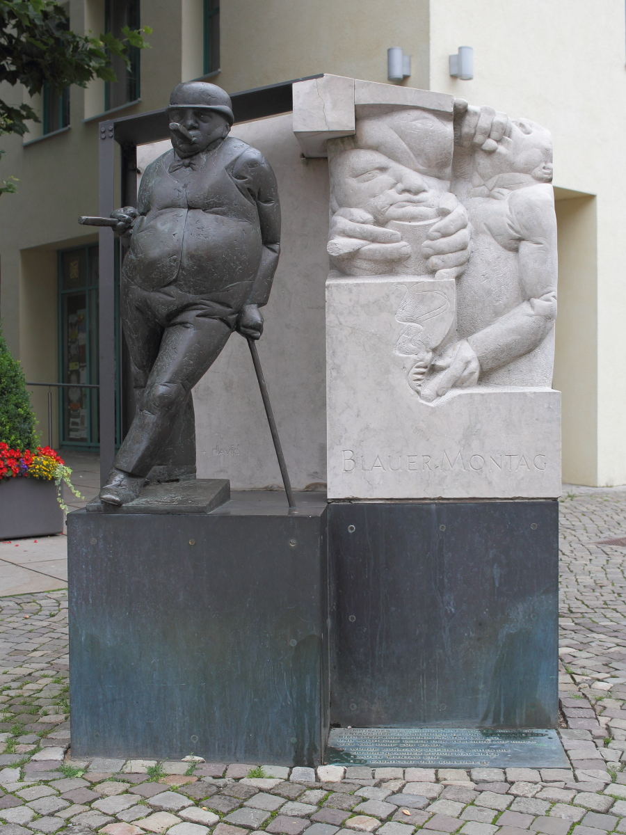 Zigarrenmacherdenkmal vor dem Rathaus in Achim (Landkreis Verden)